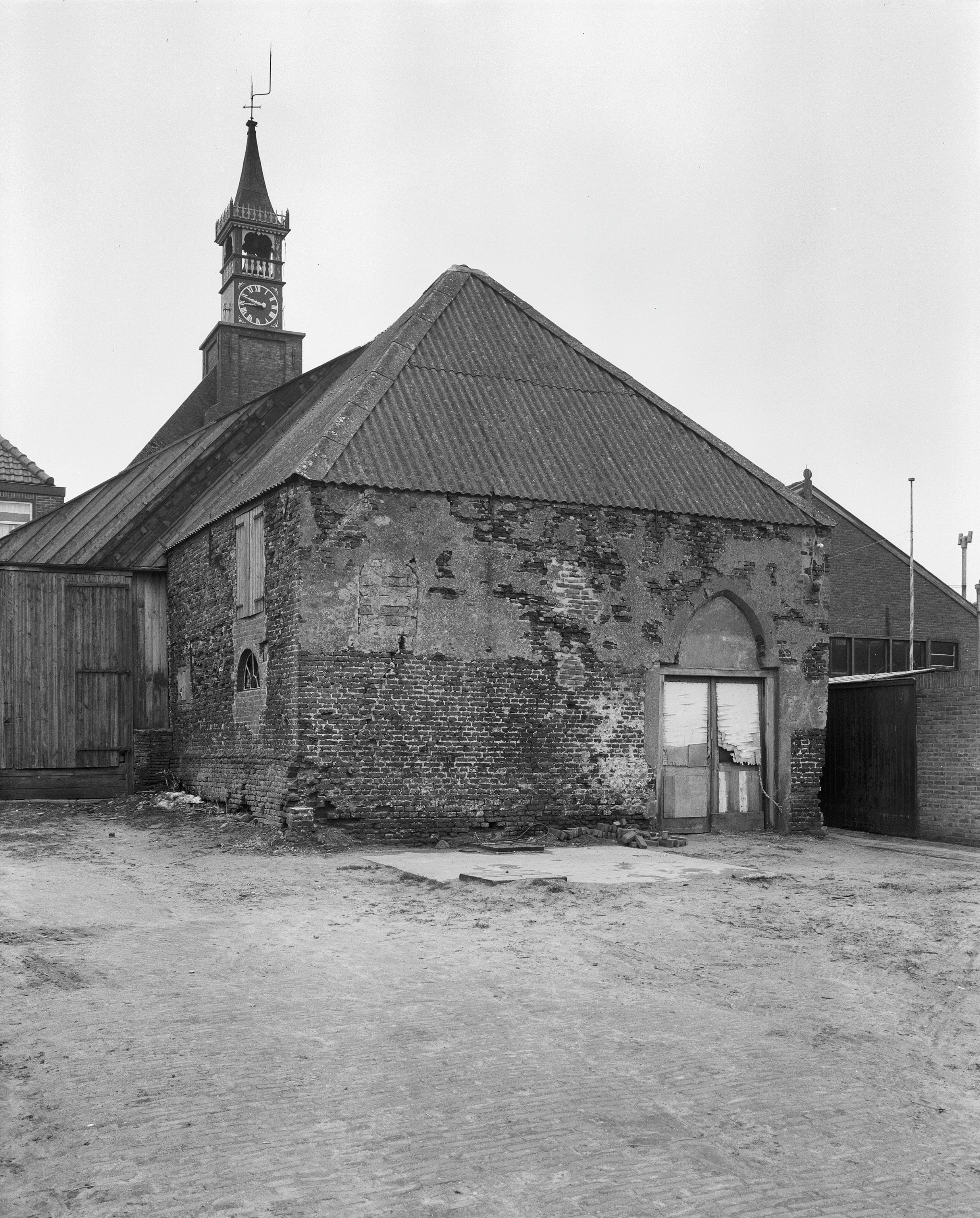 Nederlands Hervormde Kerk: exterieur overzicht naar het oosten This is a possible Rijksmonument: Find the monument in the Monuments database: in Den Oever All Rijksmonumenten in Den Oever Is this a Rijksmonument? Yes No More information about this project and help. More images to work at in Category:Possible Rijksmonumenten.